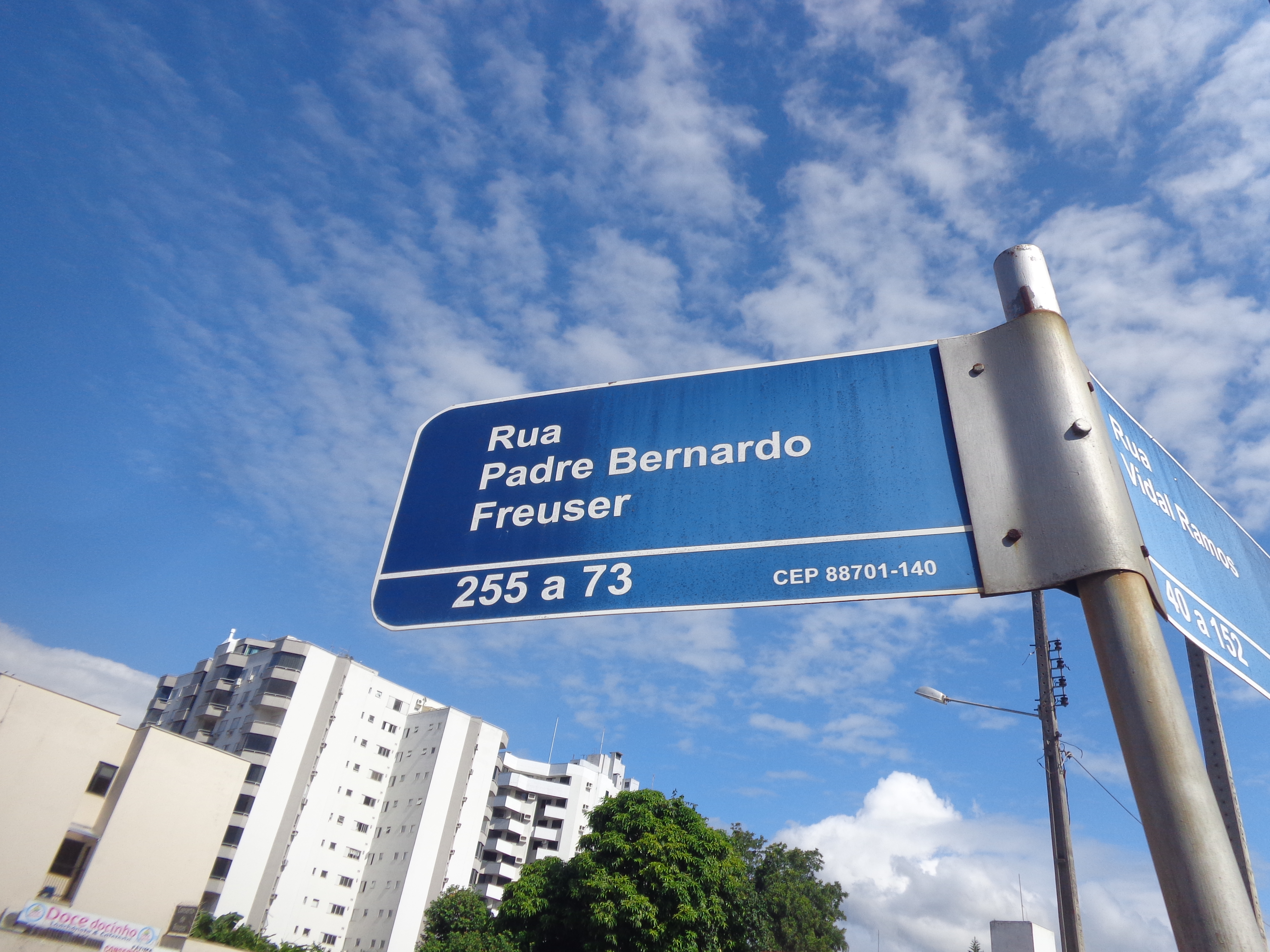 Placa da Rua Padre Bernardo Freuser esquina com a Rua Vidal Ramos defronte ao Hospital Nossa Senhora da Conceição em Tubarão-SC, próximo ao monumento ao Padre Bernardo Freise